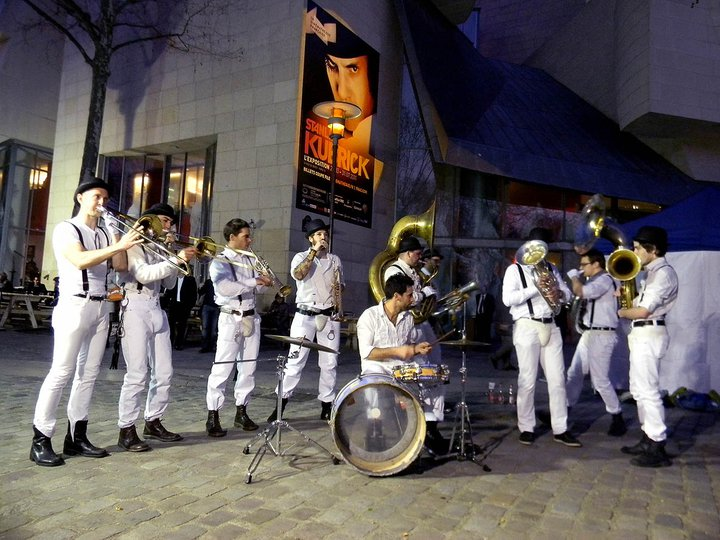 Fanfare Gut Ma Frit' des Beaux-Art de Versailles.